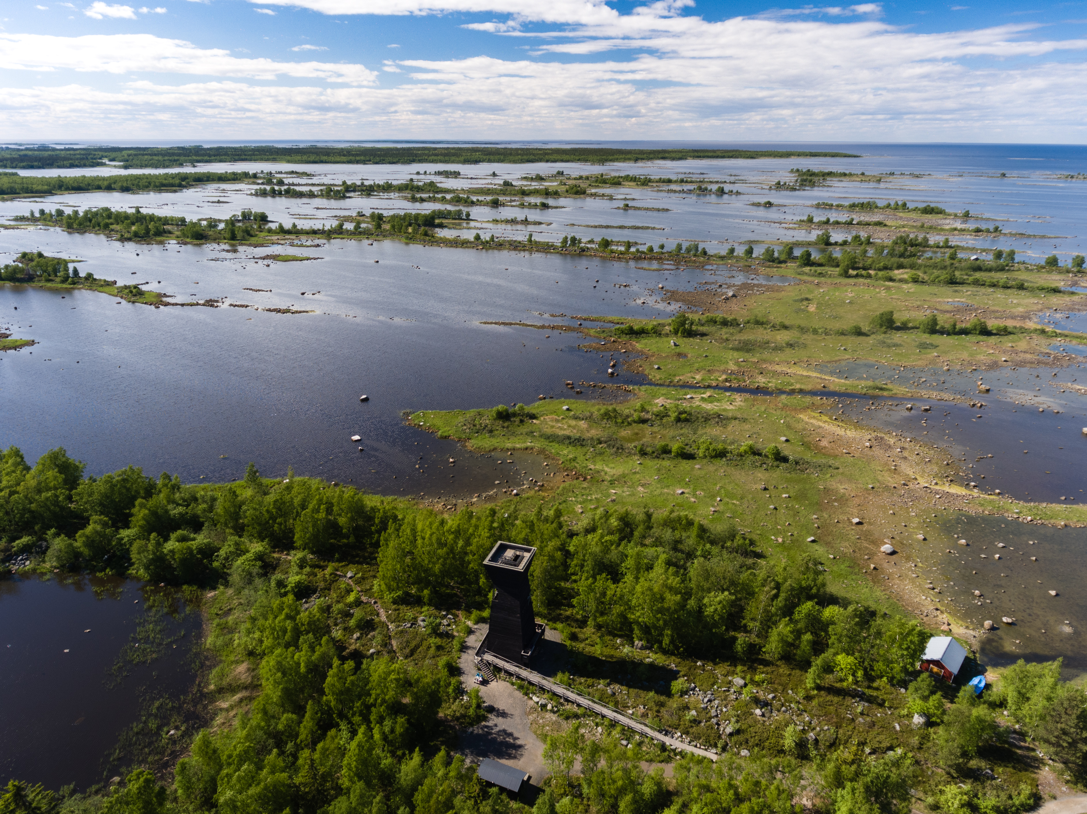 Svedjehamnin näkötorni